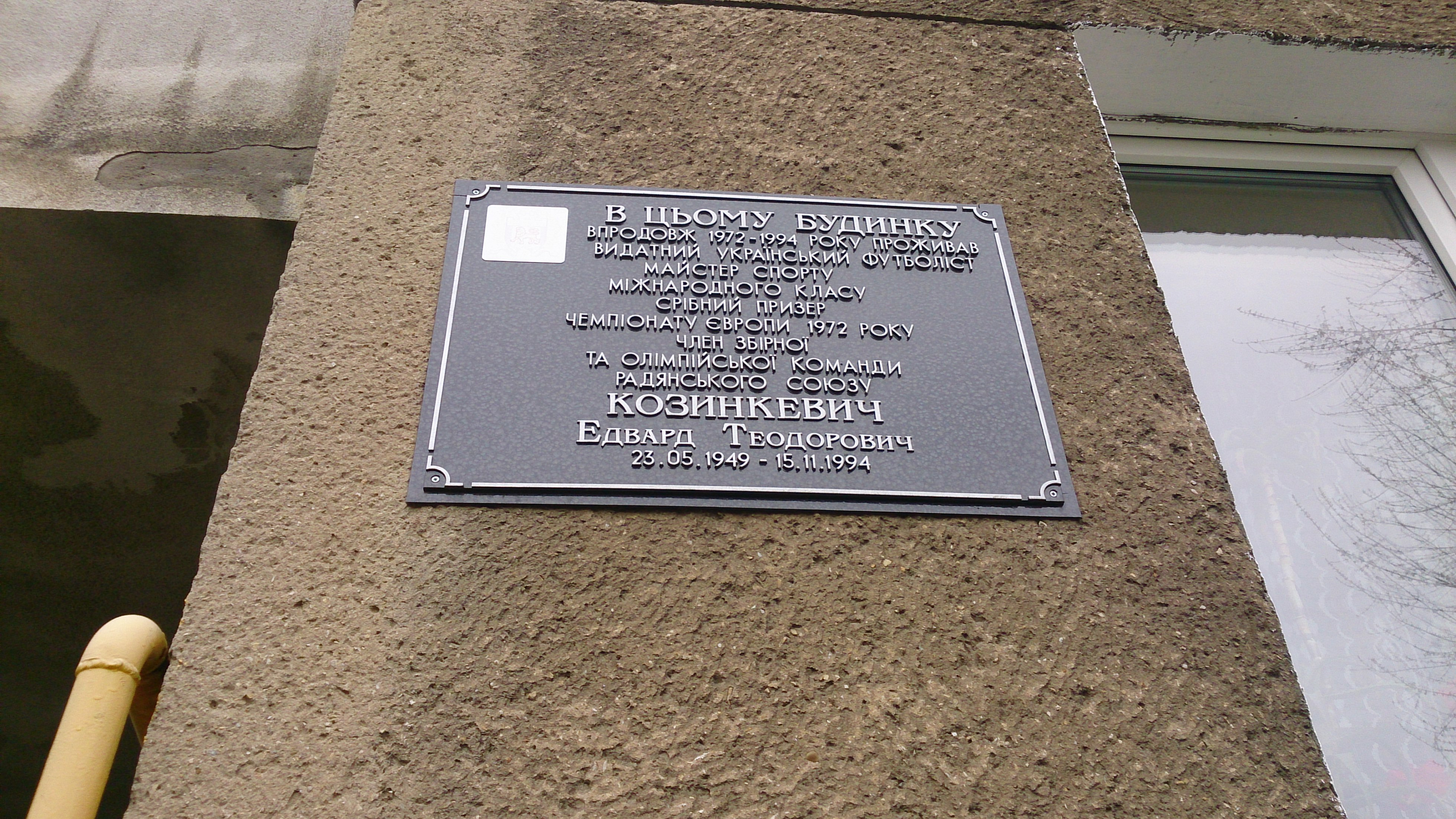 Пам'ятка дошка Козинкевича Едварда Теодоровича